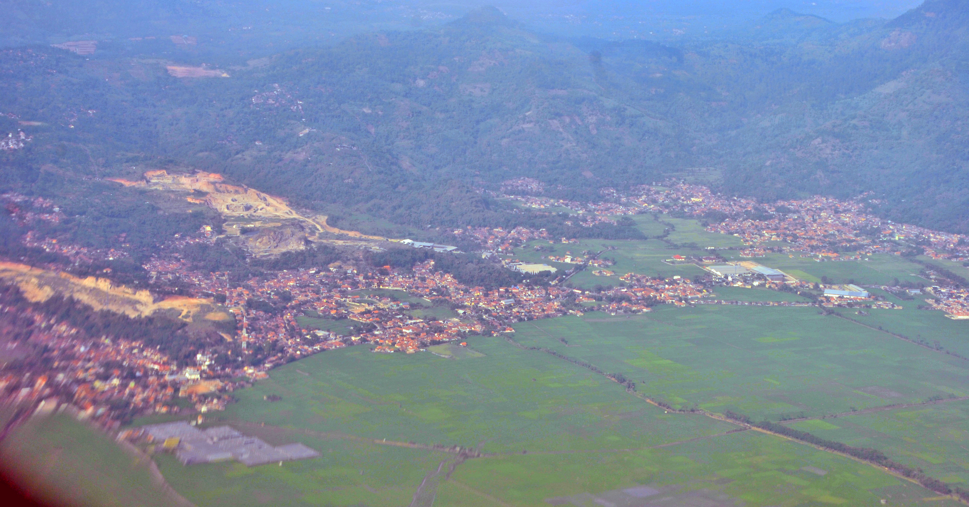 Sekitar Bojongsoang